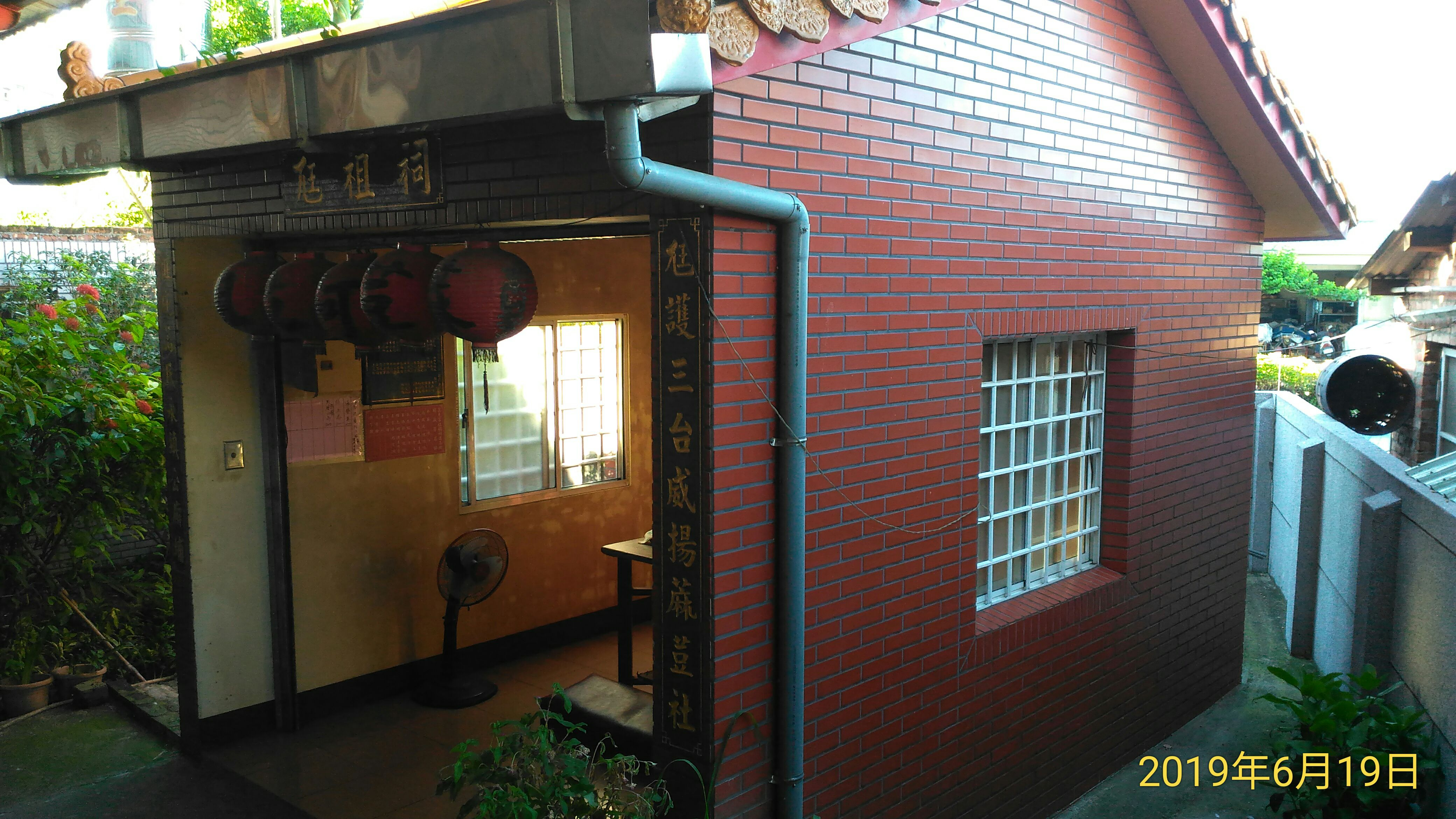 位於麻豆尪祖廟後方，祭祀西拉雅族阿立祖的尪祖祠